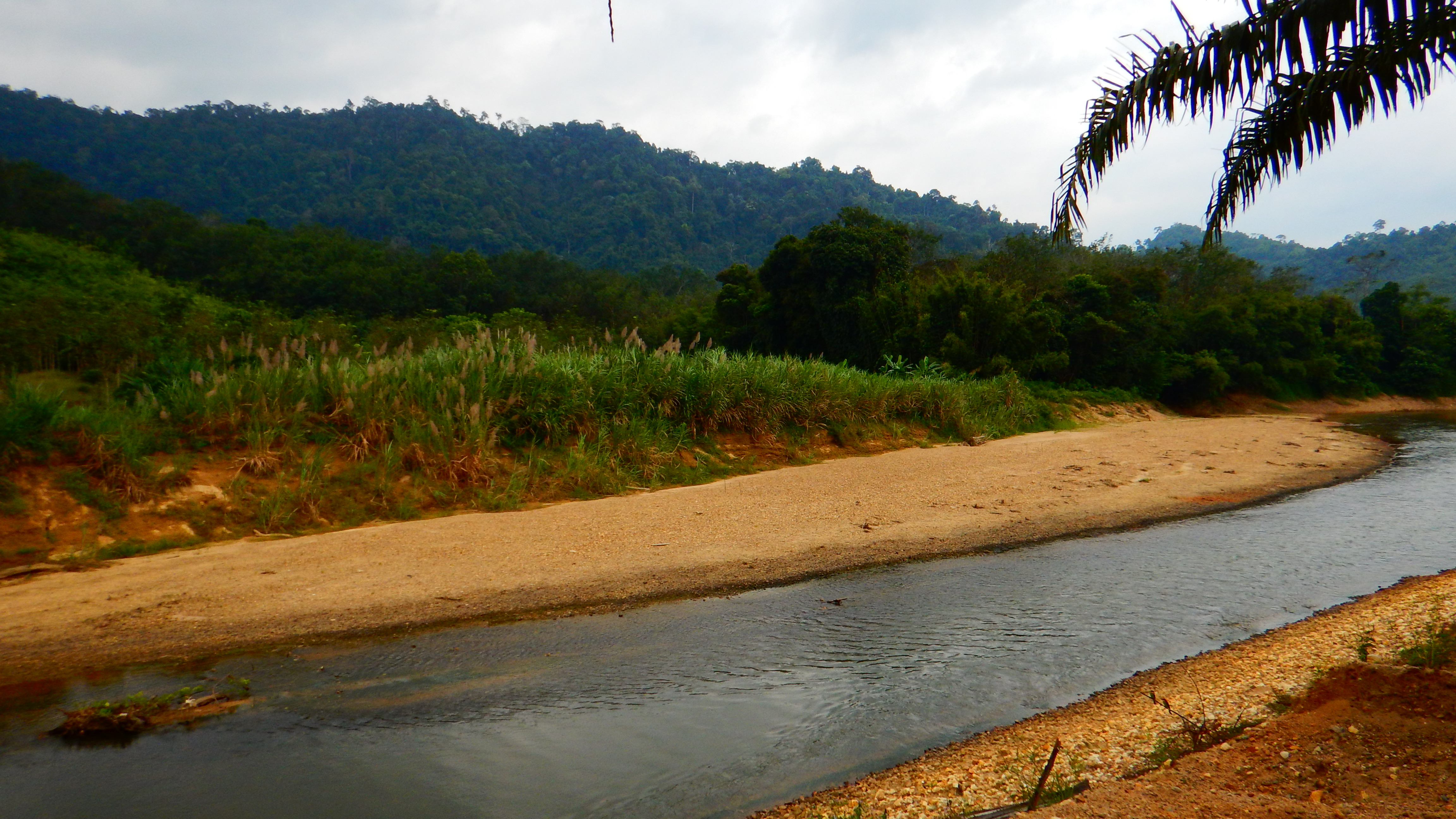 Phan-Nga, December 2014